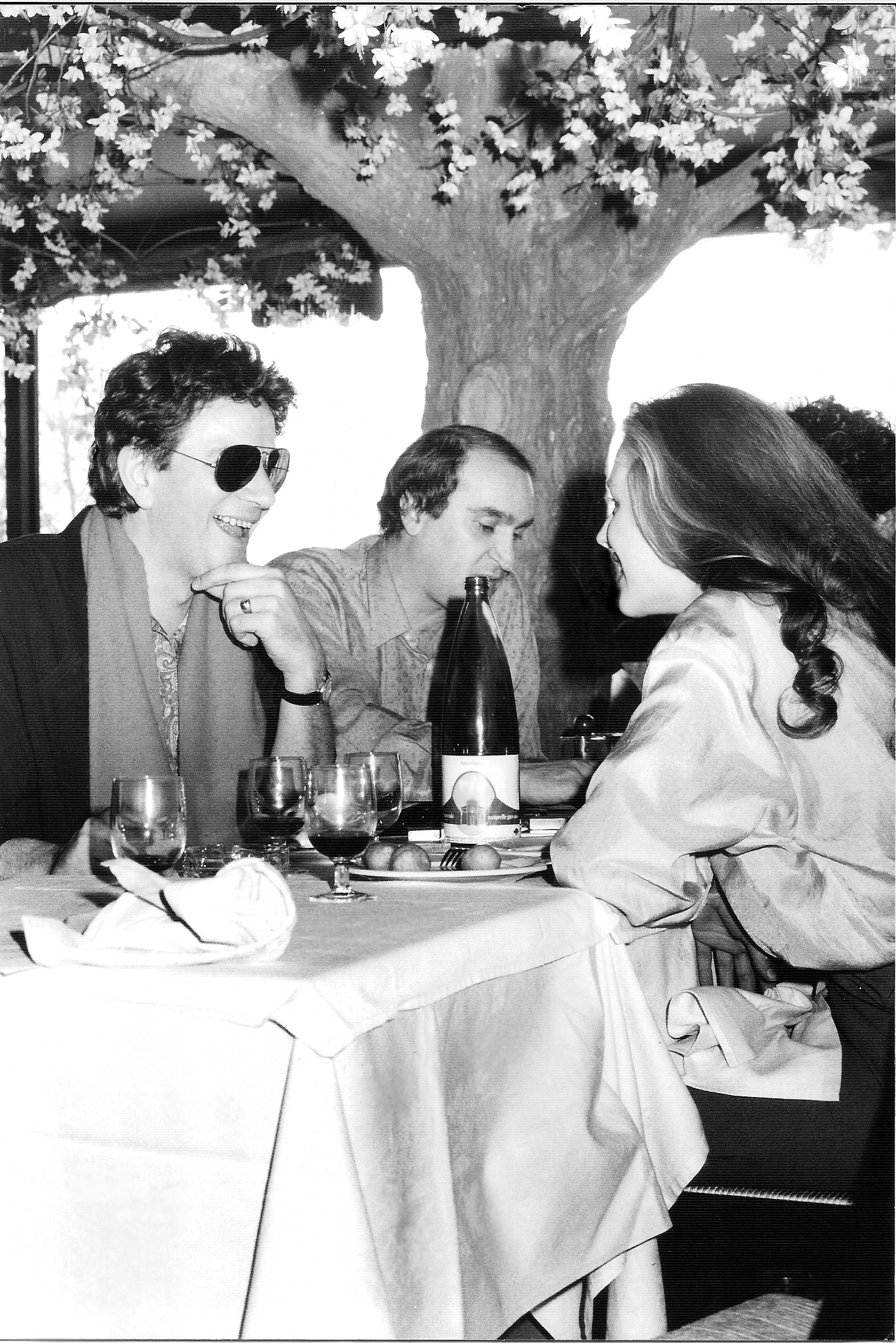 René-Louis Baron et Valérie Pascal (Miss France)